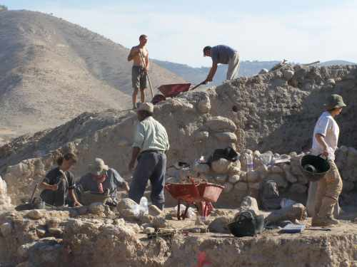 Ausgrabungen im Sommer 2006 am Tall Zira´a - Ausgrabung des BAI Wuppertal und DEI Jerusalem+Amman; und